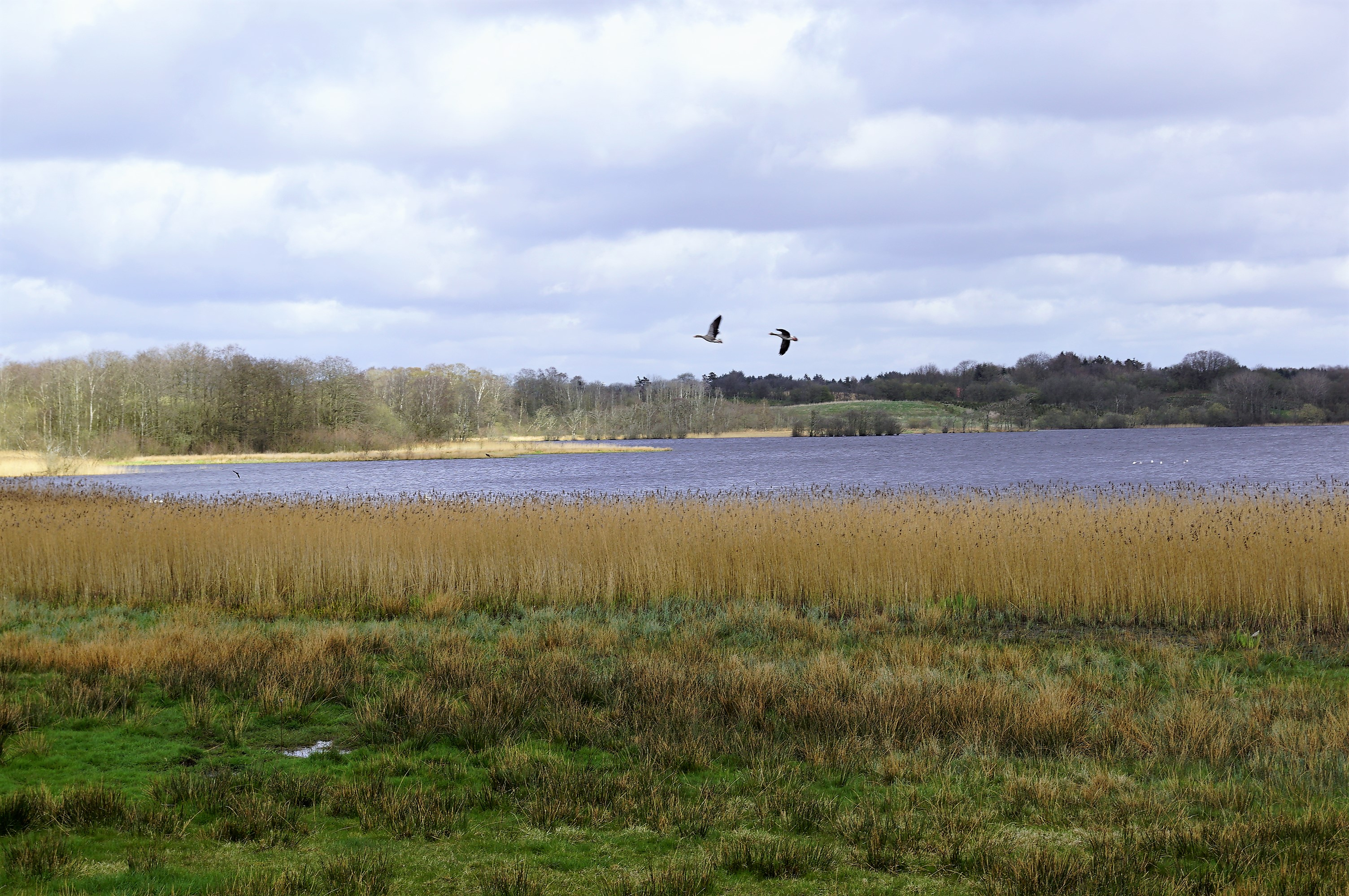 Nipsgård Sø set mod nordøst